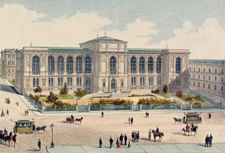 Königliche Landesbibliothek Stuttgart, Kolorierter Holzstich nach einer Zeichnung von Eugen Macholdt, 1886. Vorn: Neckarstraße mit Pferdebahn, hinten: Justizgebäude, rechts: Staatsarchiv.